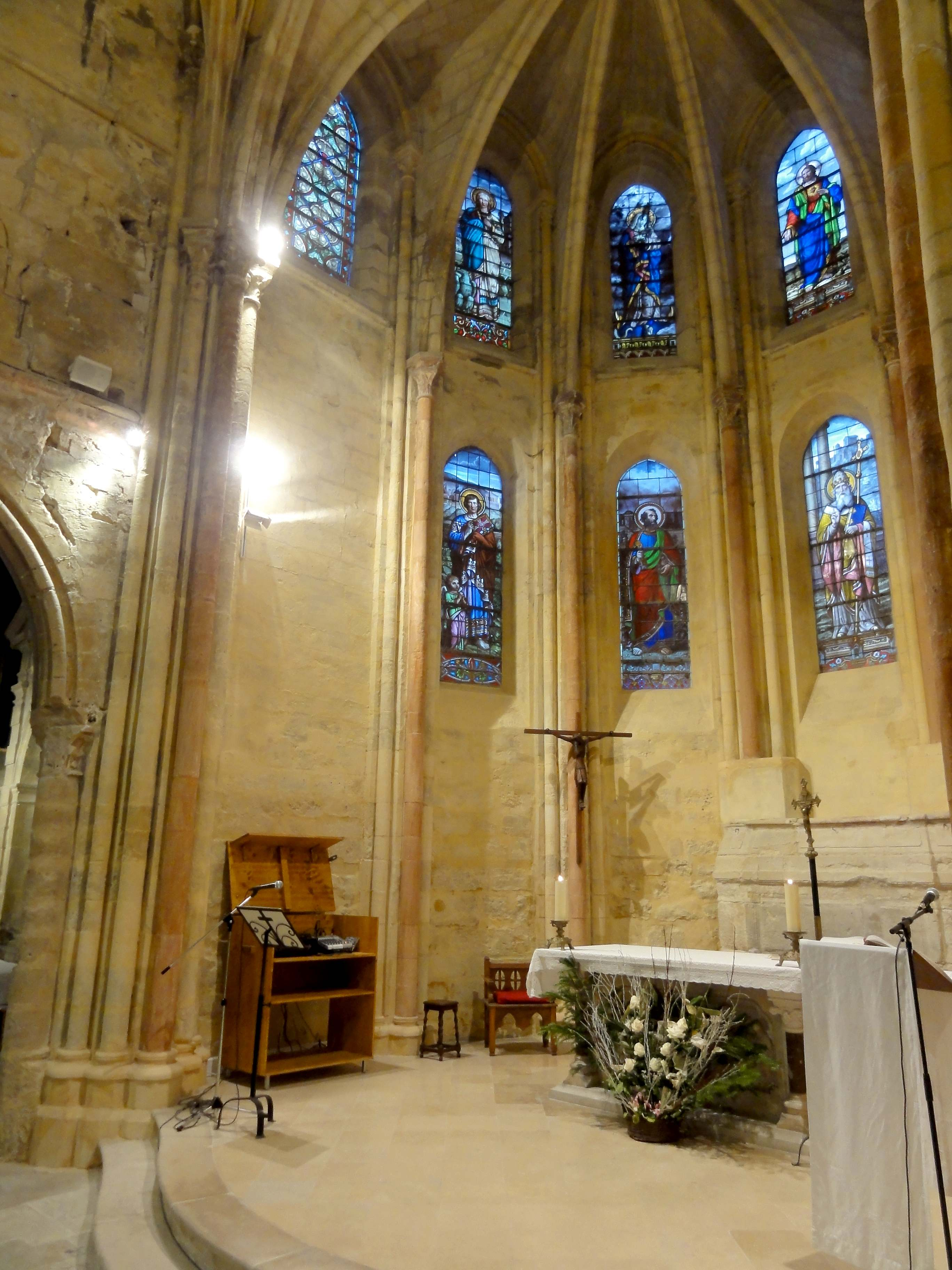 Intérieur de l'église - voir titre.